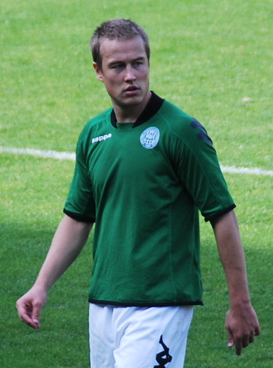 Fodboldspilleren Andrei Sidorenkov fra Viborg FF. Her i 1. divisionskampen imellem Viborg FF og Brønshøj Boldklub på Viborg Stadion.